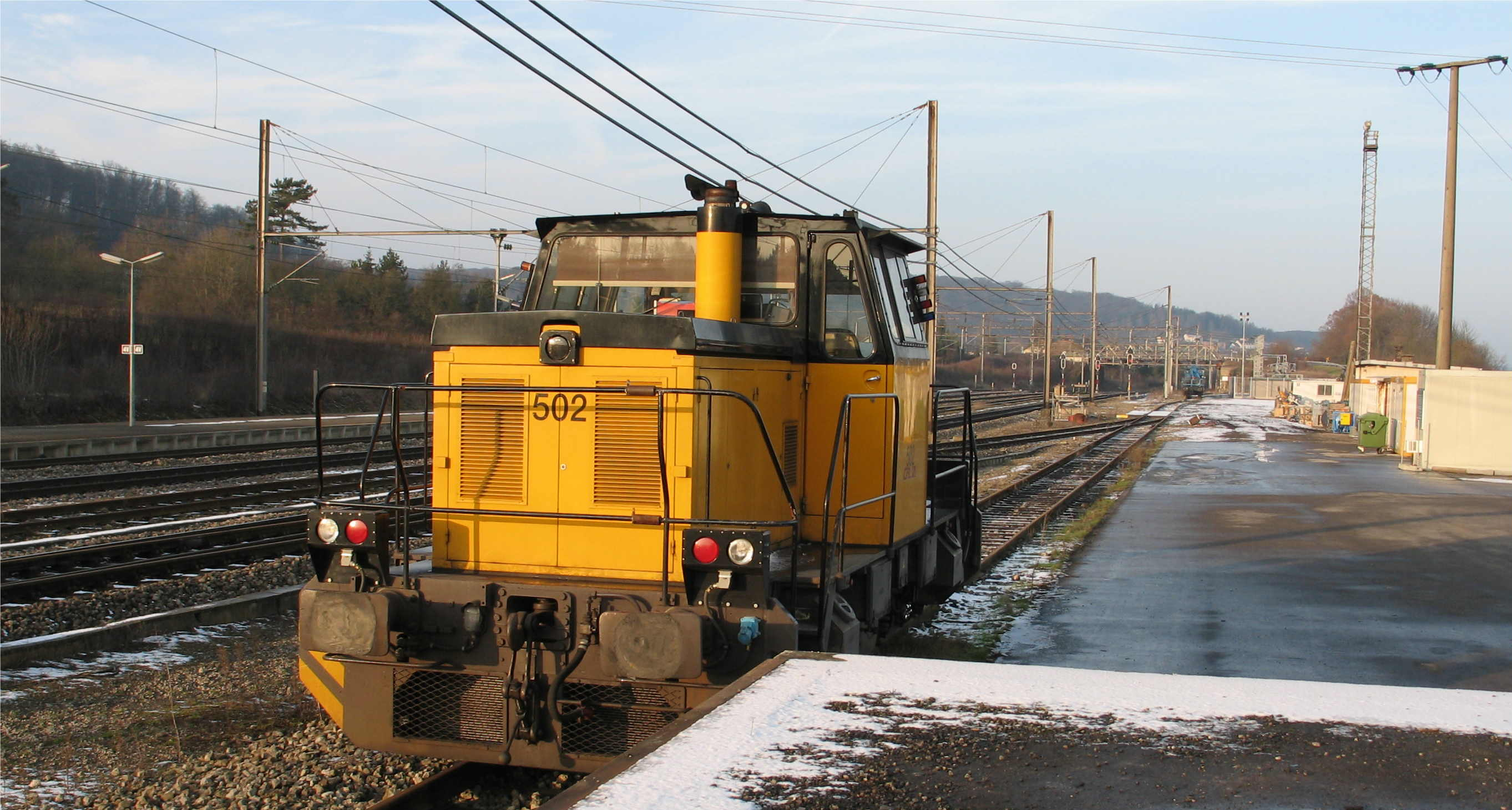 Op der Gare zu Éiter